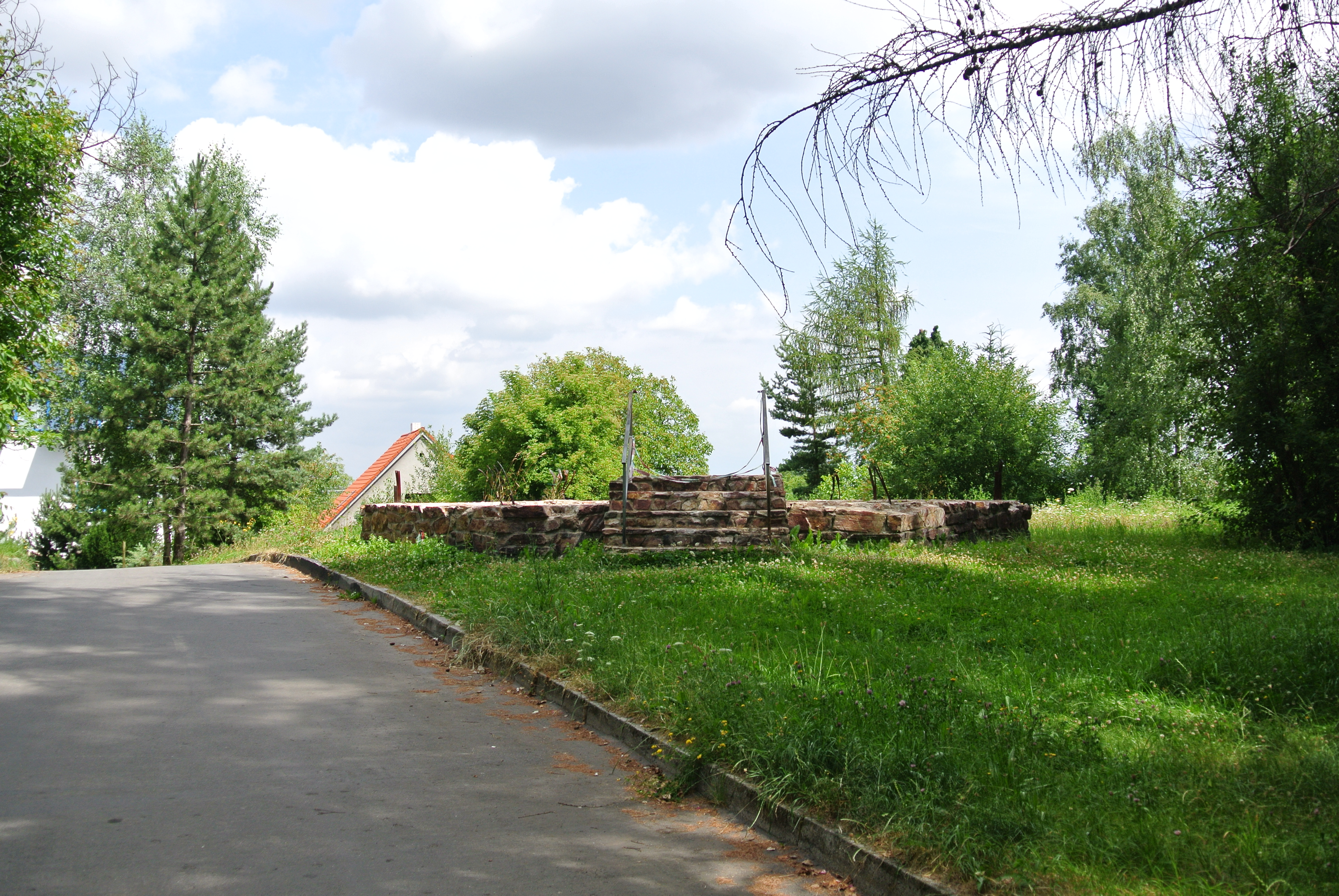 Rozhledna Hýlačka ve Větrovech v Táboře - aktuální stav